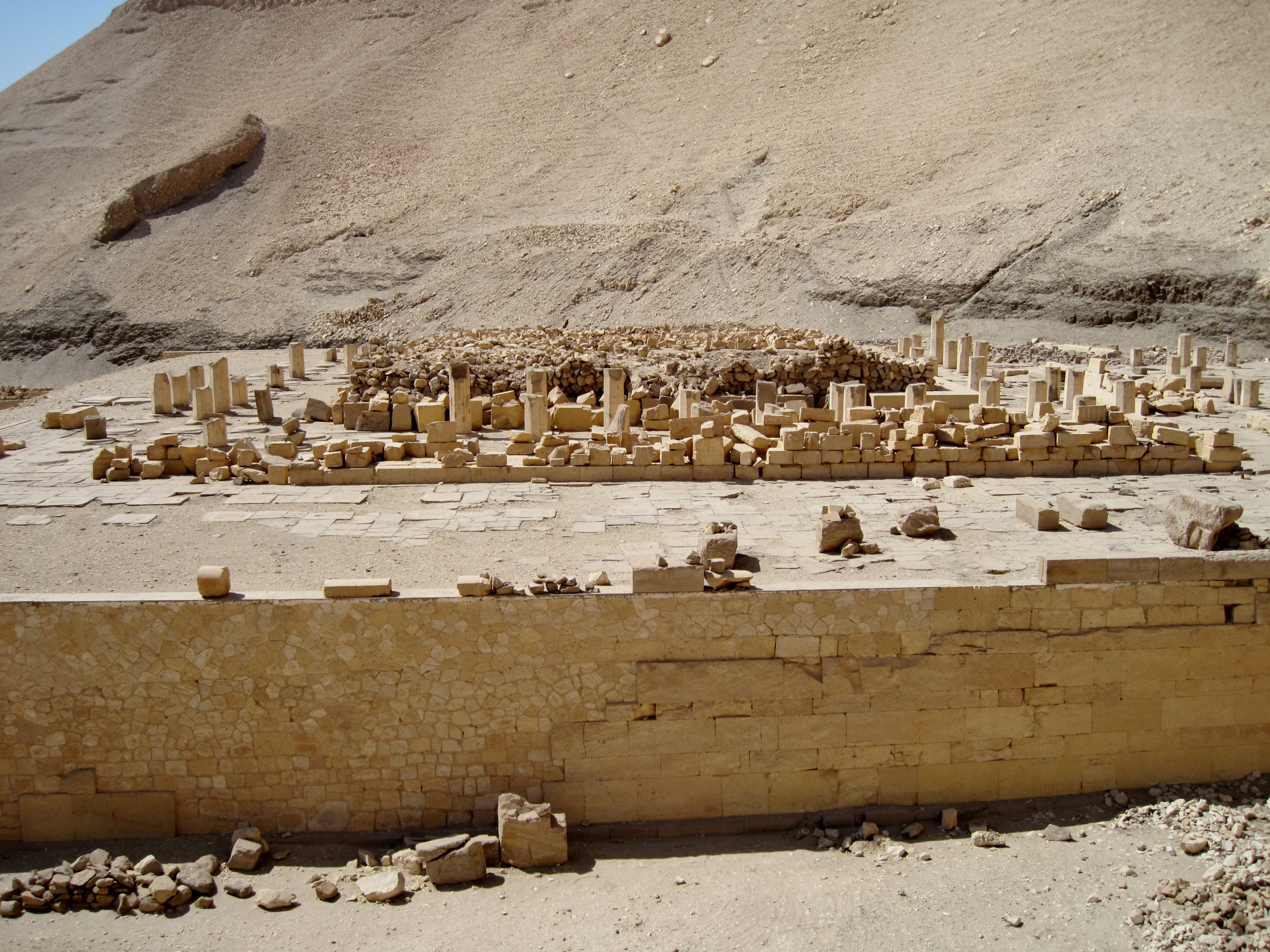 Reste des Totentempels des Mentuhotep II. in Deir el-Bahari nordwestlich von Luxor, Ägypten